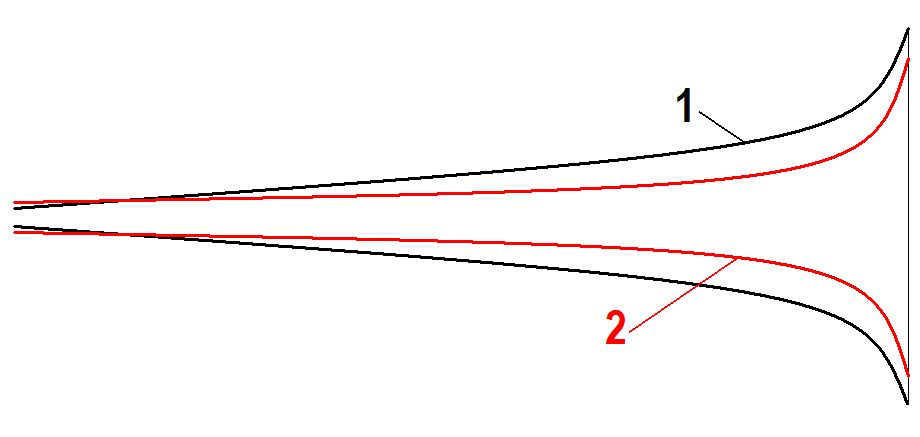 Unterschied der Mensur von Flügelhorn (1) und Trompete (2).